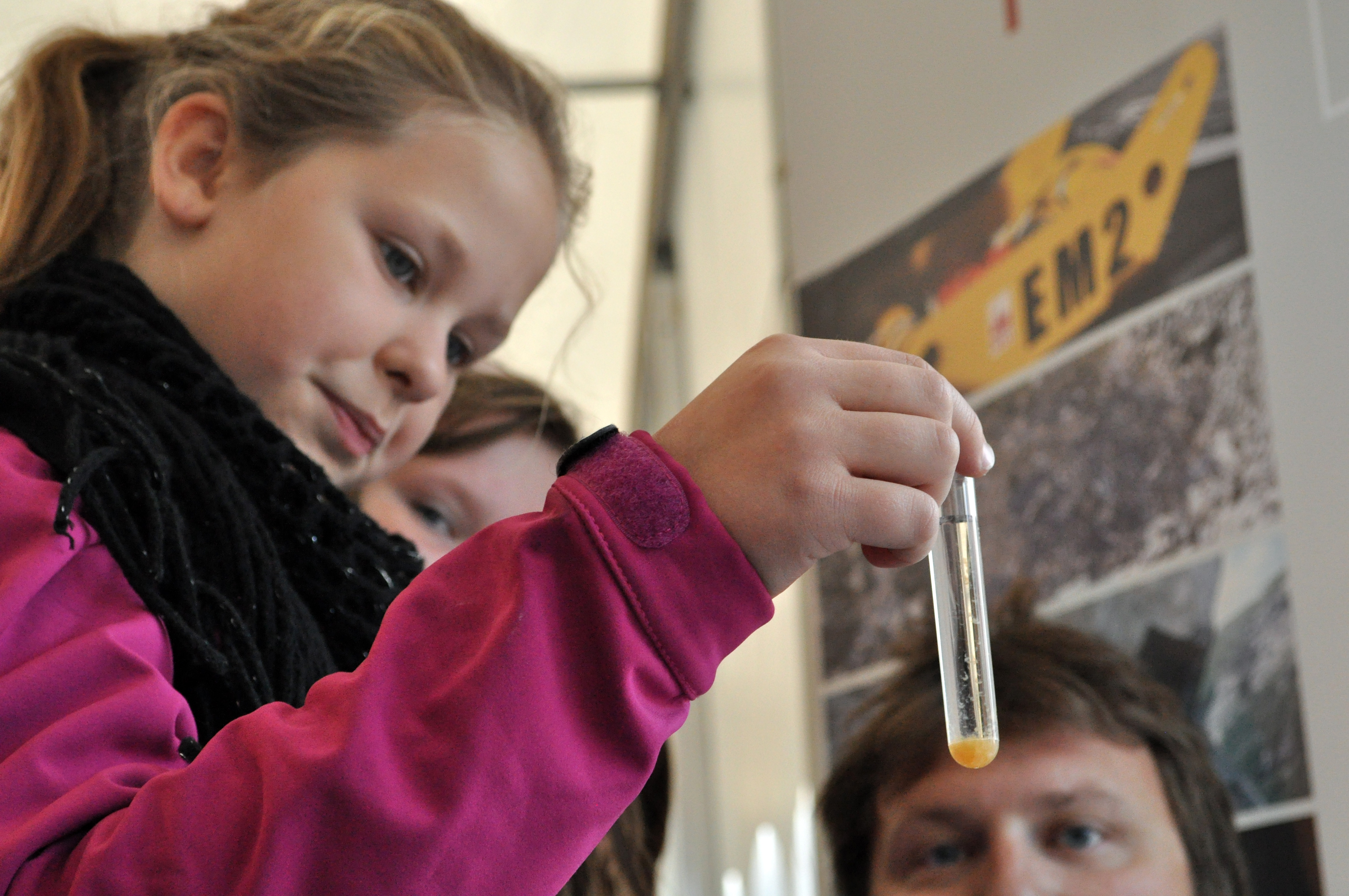 Trondheim Havn, Trondheim kommune og NGI deltok med standen Renere havn under Forskningsdagene 2011 i Trondheim. Der fikk barna lære om hvorfor sjøbunnen er forurenset og hva man kan gjøre med det. Analysesenteret følger med når barna tester utfelling av metall i sjøvann.